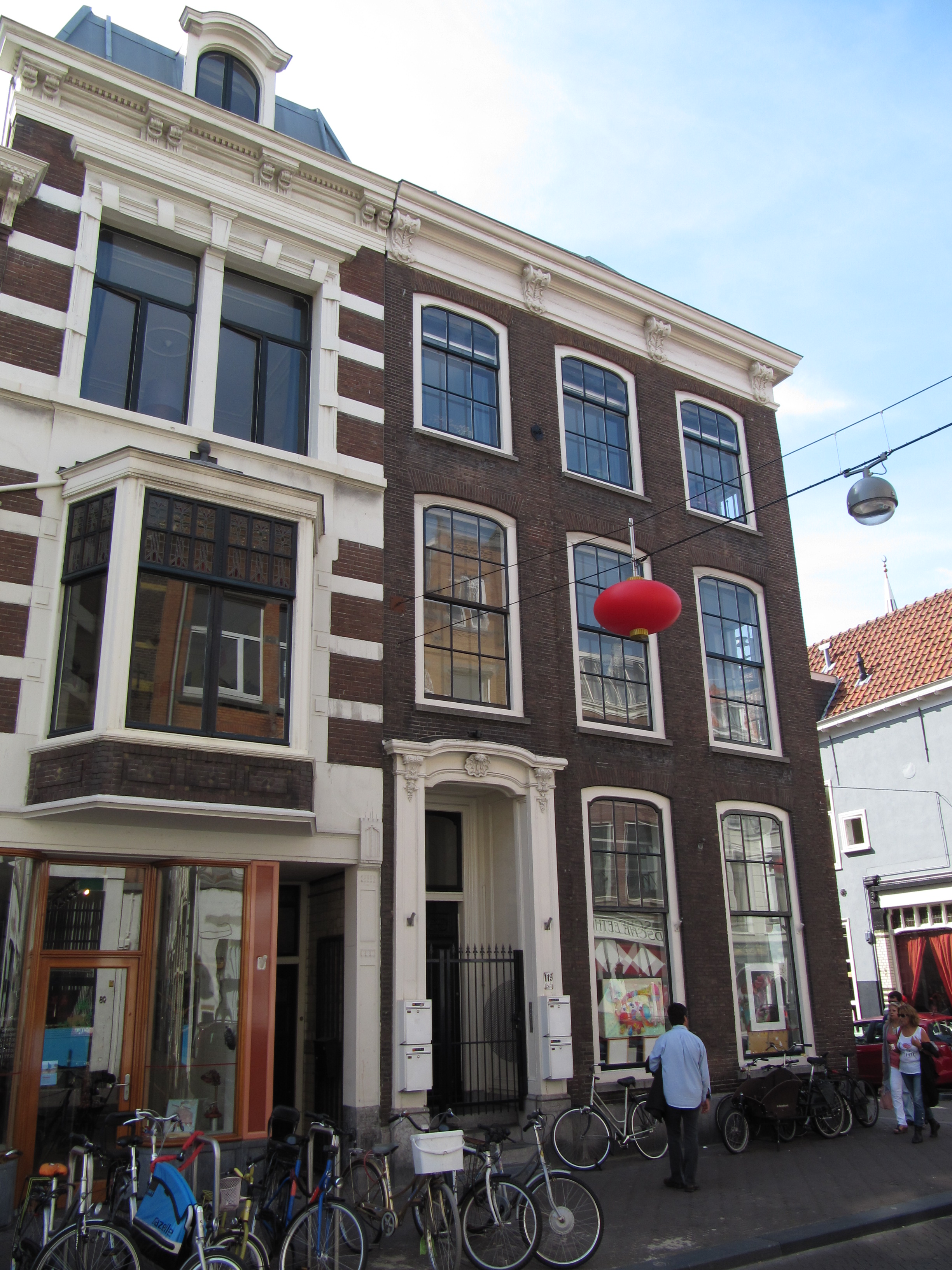 RM18079 Den Haag - Wagenstraat 119.jpg